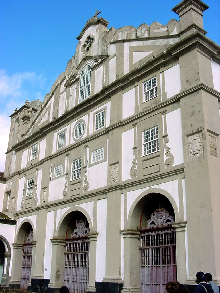 Igreja de São Francisco, Convento de São Francisco, Actual Museu de Angra do Heroísmo, Angra do Heroísmo, ilha Terceira, Açores, Portugal.